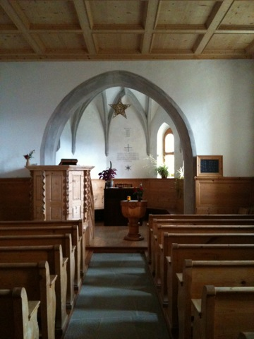 reformierte Kirche Trans, Kanton Graubünden